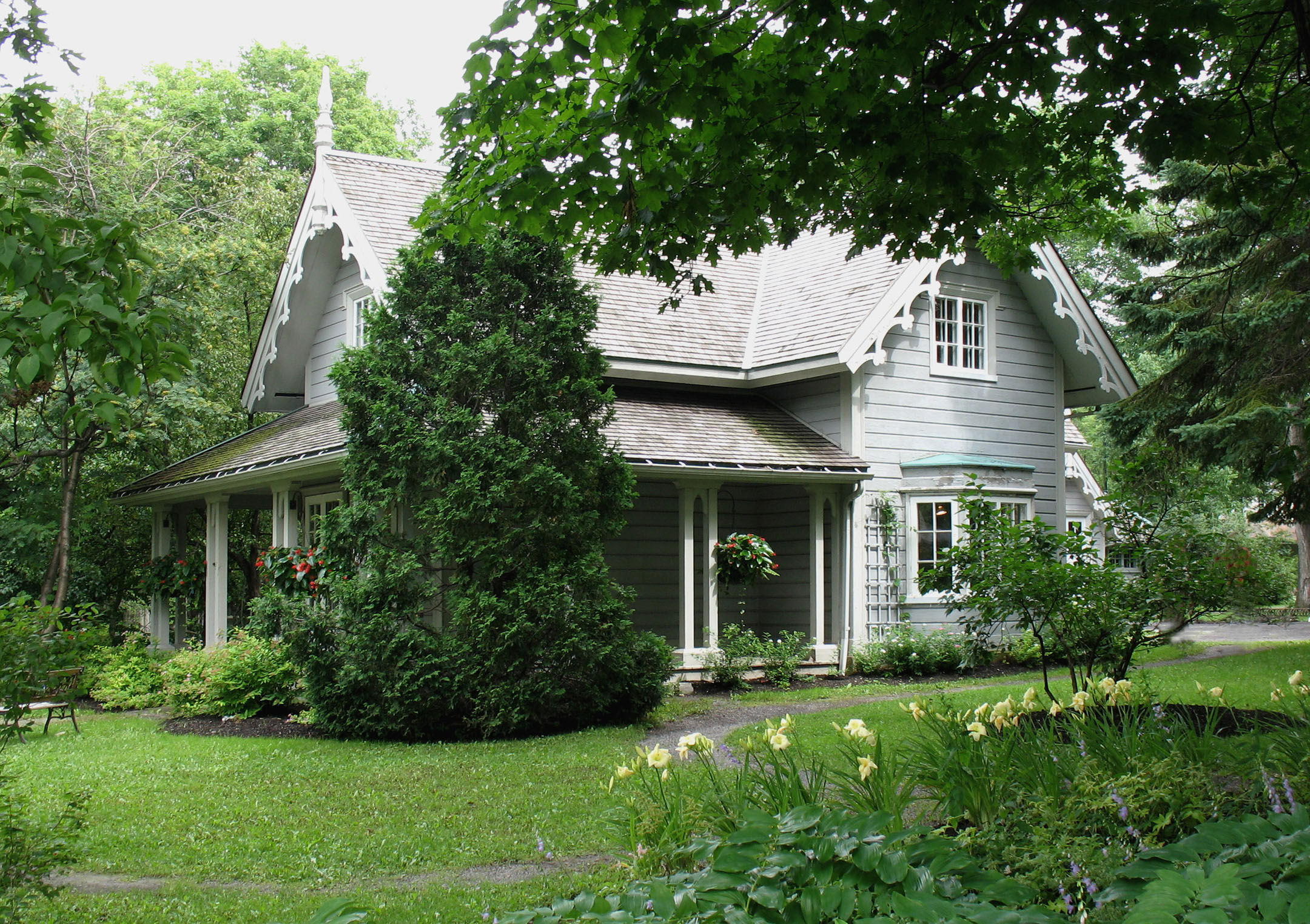 Villa Bagatelle, bâtisse du XIXe siècle située à Québec dans l'arrondissement de Sainte-Foy–Sillery. Province de Québec. Canada